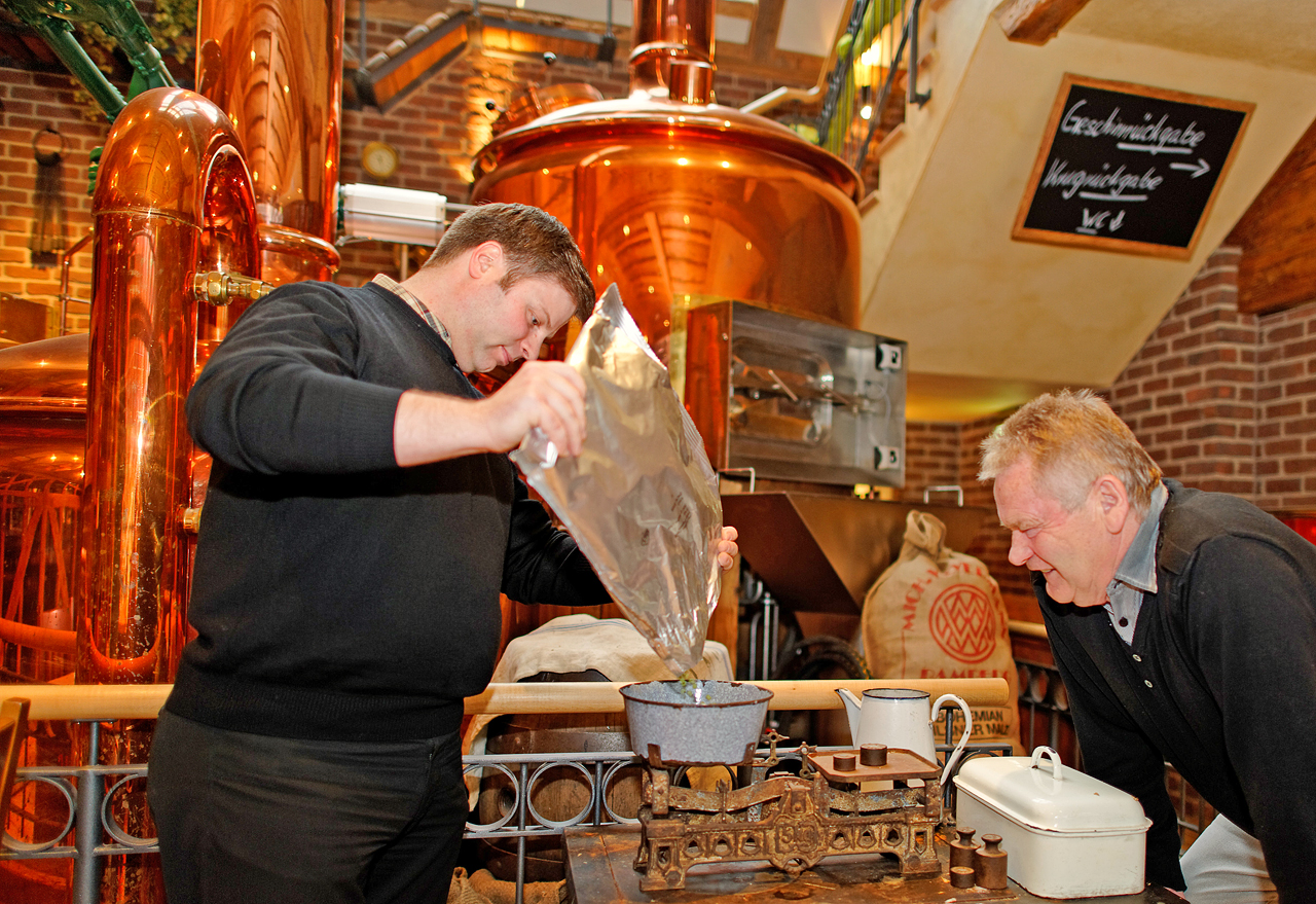 Pfarrer Steffel und Bürgermeister Heribert Weber wiegen Hopfen ab